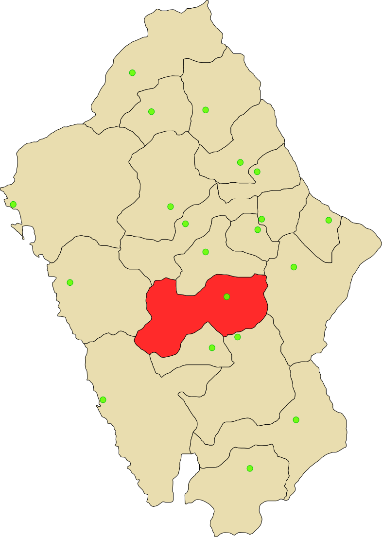 Provincia de Huaraz de departamento Ancash